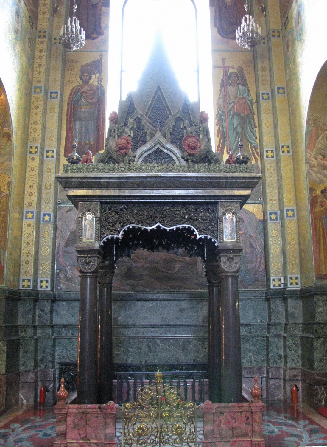 Восьмигранный шатр, установленный на месте, где был смертельно ранен император Александр II. Изготовлен из уральских камней (родонит, змеевик, яшма и др.) камнерезами Екатеринбургской Императорской гранильной фабрики.